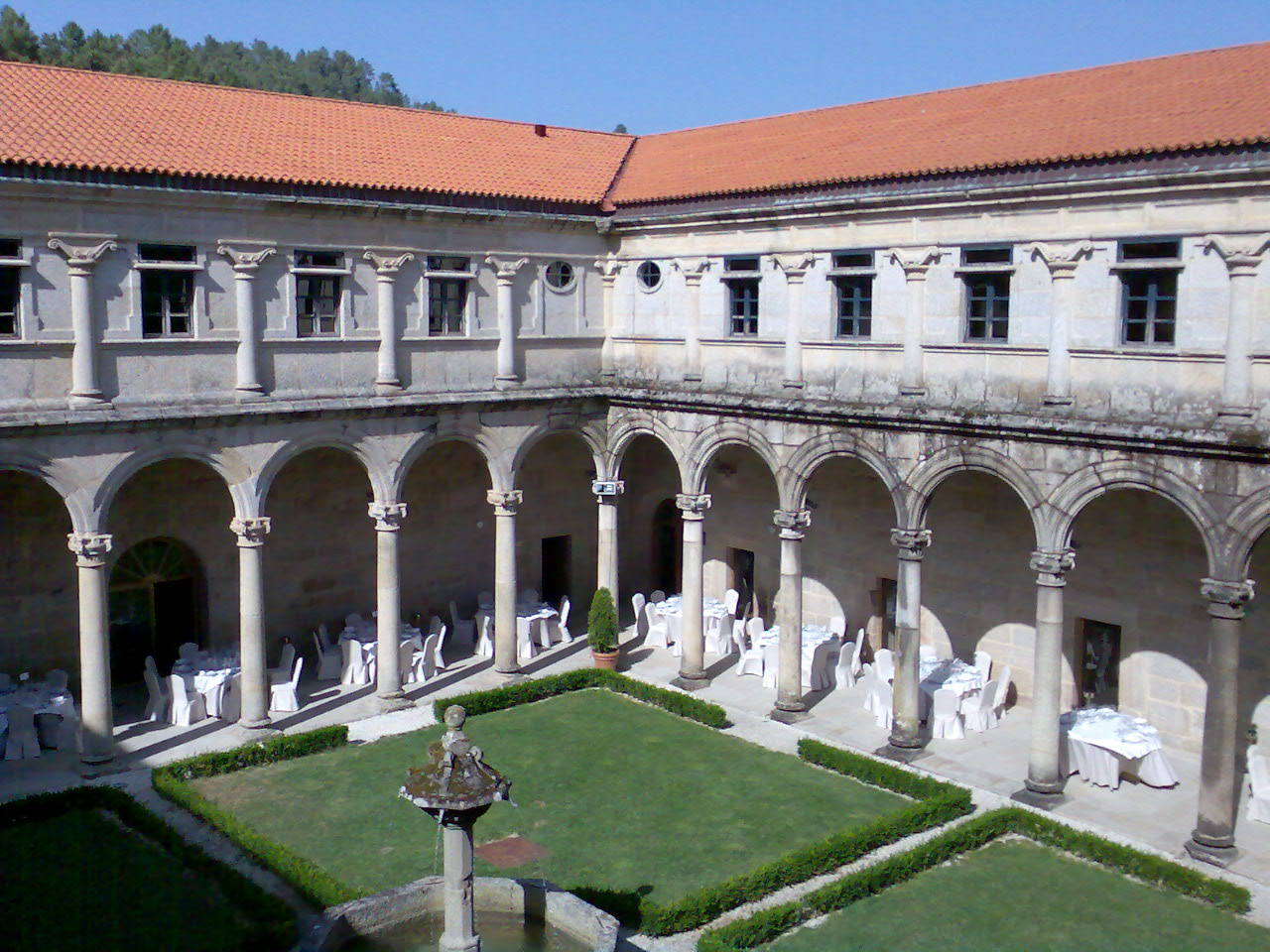 Claustro oriental ou doméstico do mosteiro de San Clodio (Leiro)